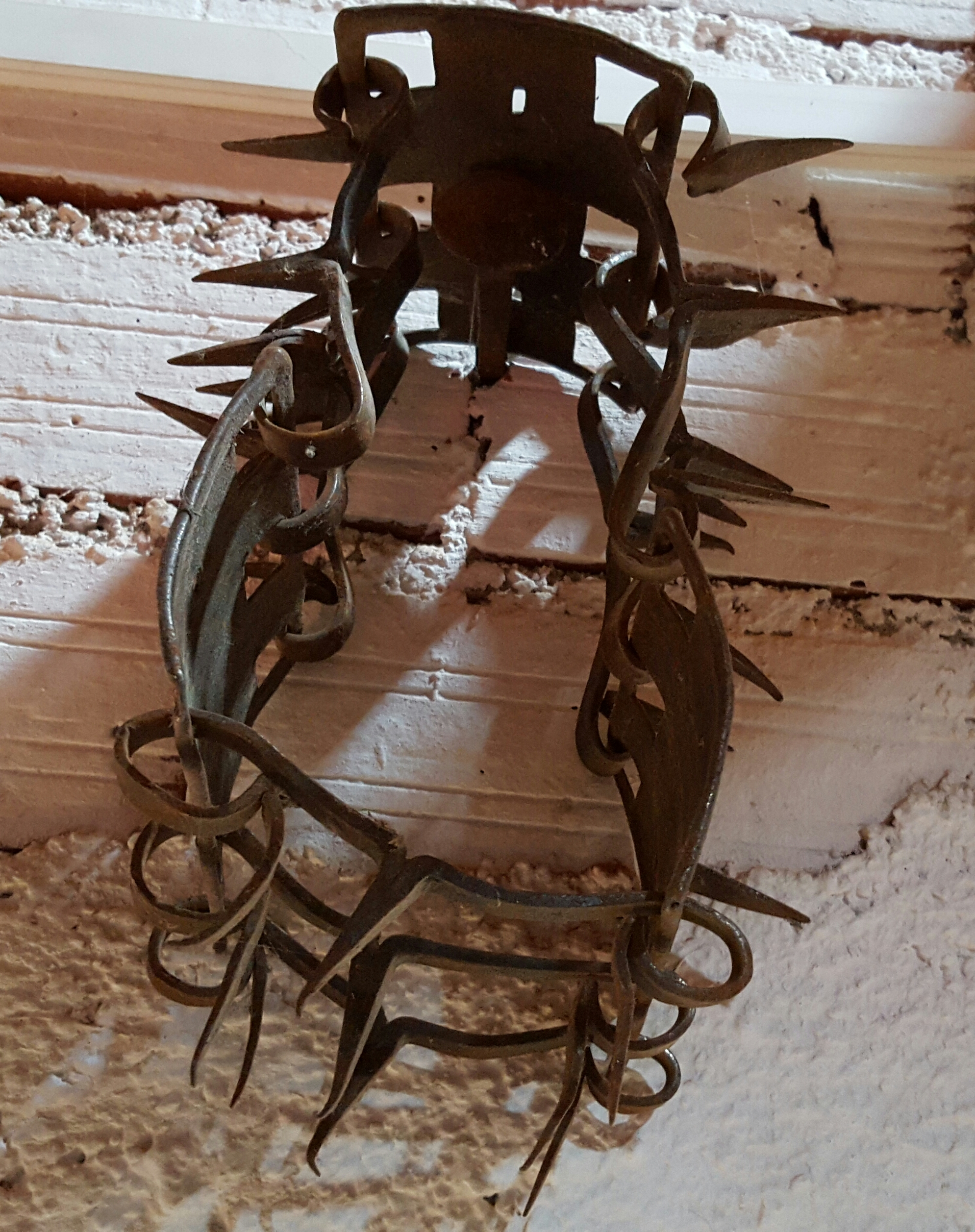 Carlanca o collar de perro mastín español, utilizado en la provincia de Ávila, para acompañar a los rebaños durante la trashumancia en España.